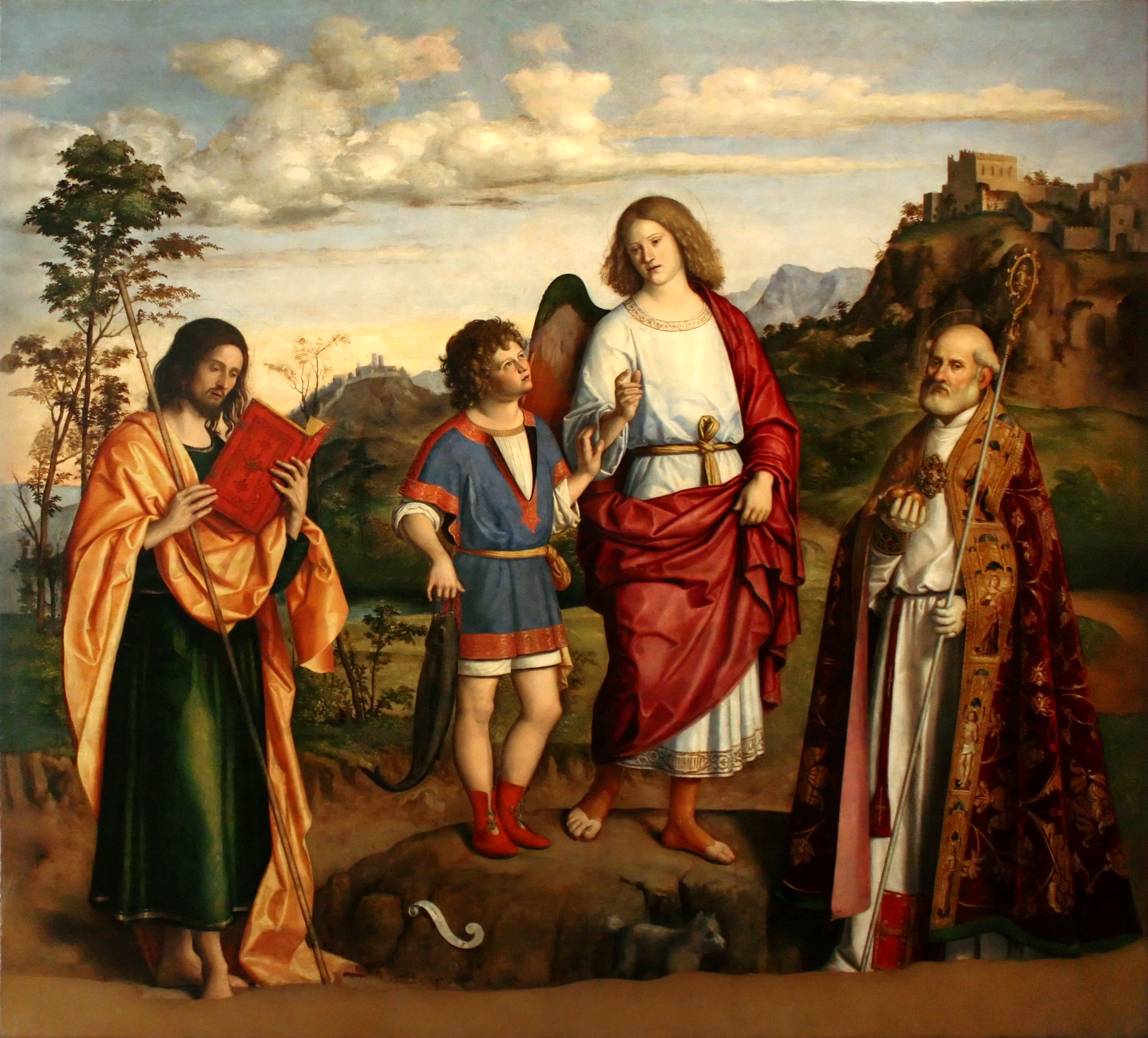 Provenenienza : Chiesa Santa Maria della Misericordia.